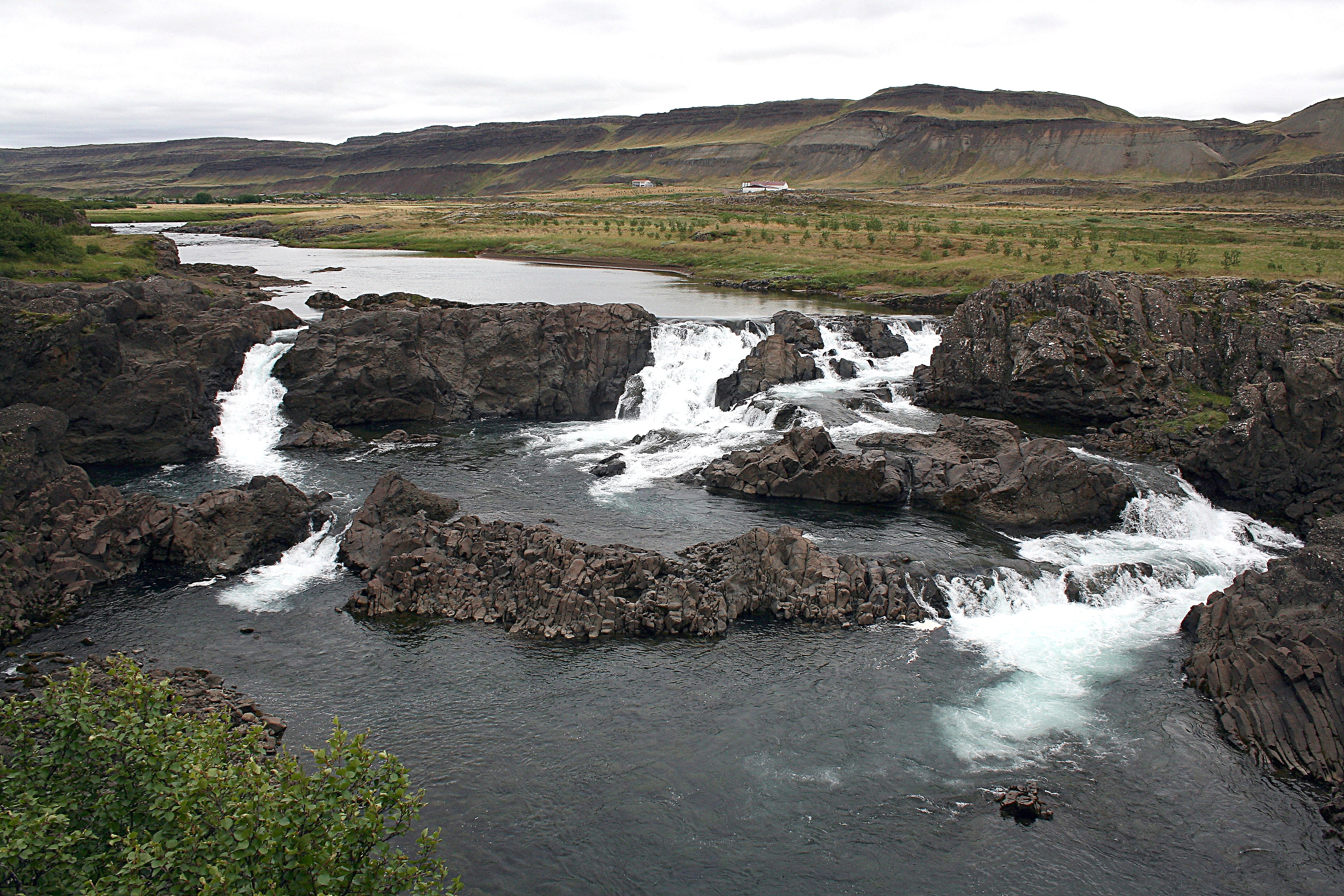 Vesturland: Der Wasserfall Glanni nahe bei der Ortschaft Bifröst im Lachsfluß Norðurá_(Mýrar) (isländisch: Norðurá, Glanni).